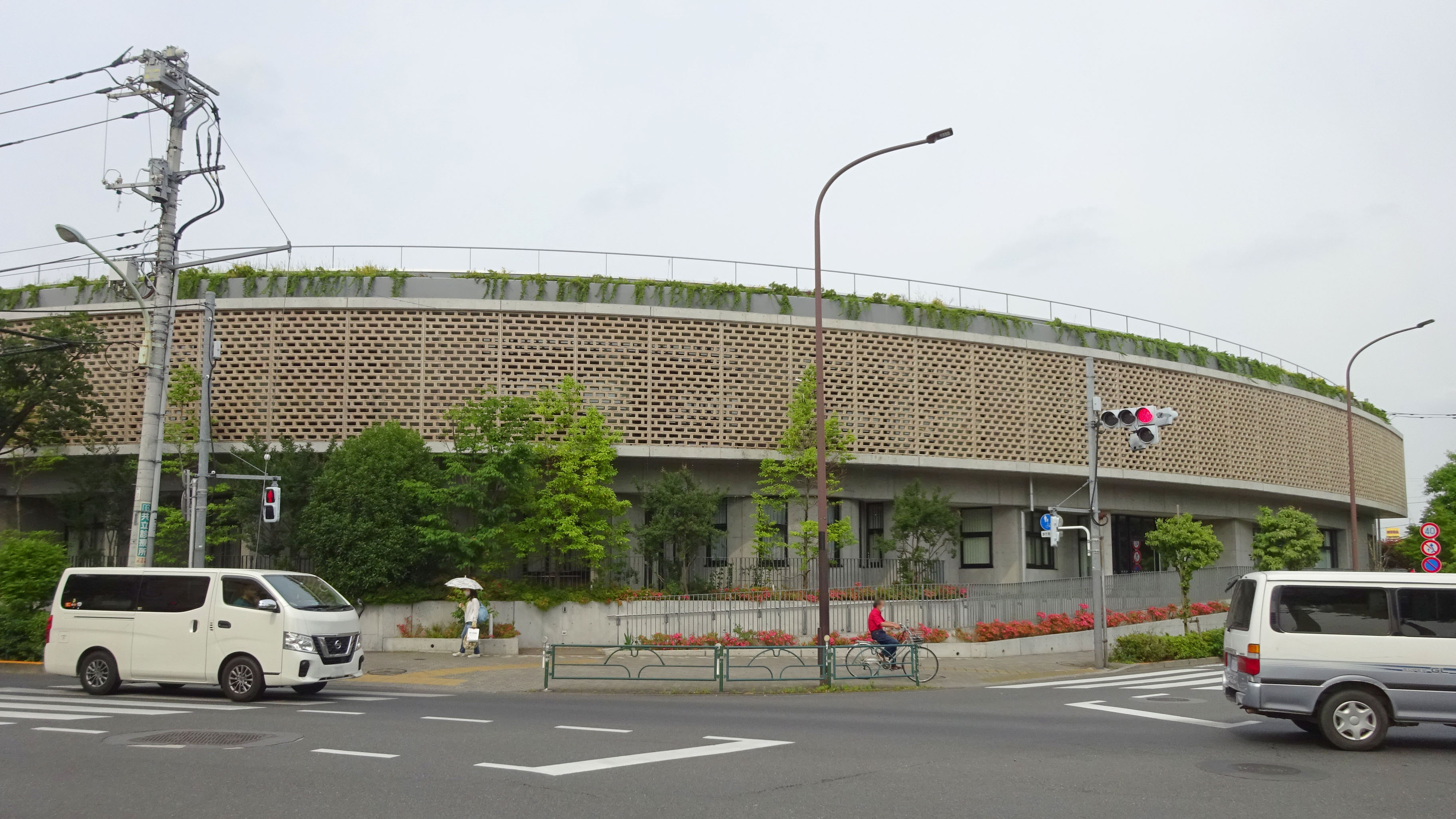 きたまちセンター